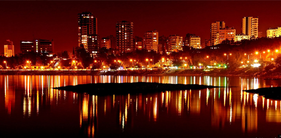 Seyhan Gölü'nden Çukurova. (foto: Nadir Yılmaz)